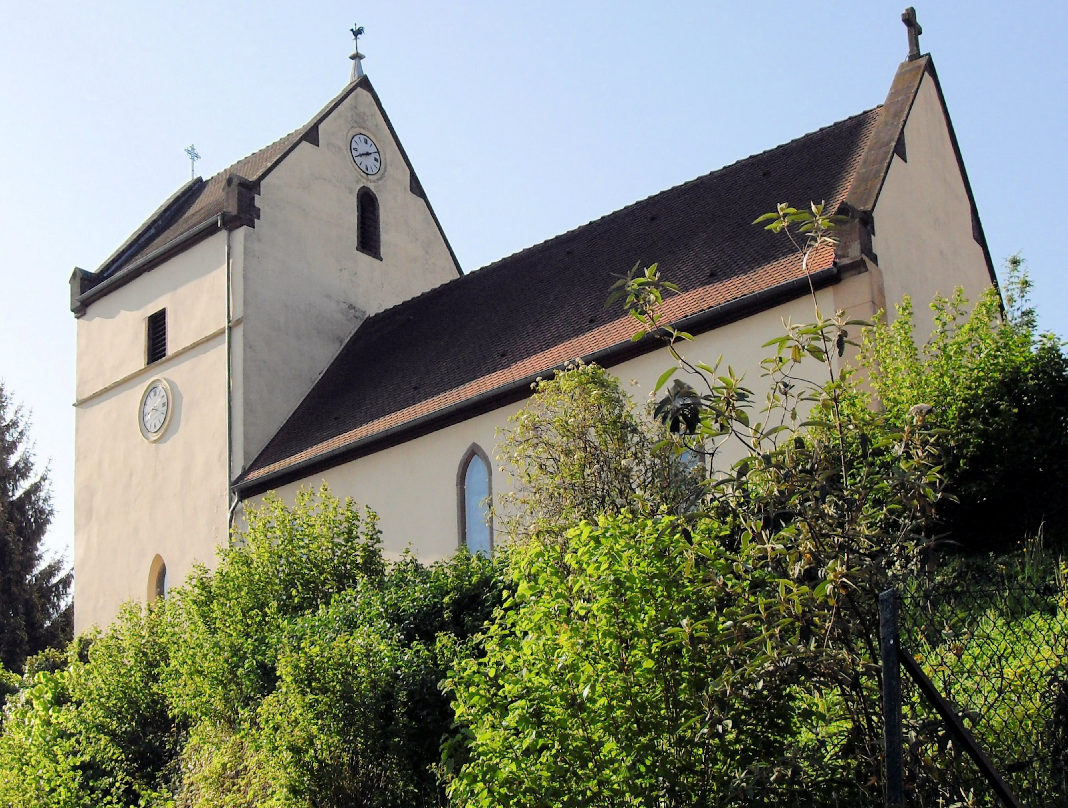 L'église Saint-Jean-Gualbert à Rammersmatt